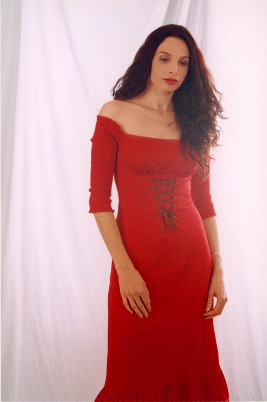 גלית אלדר